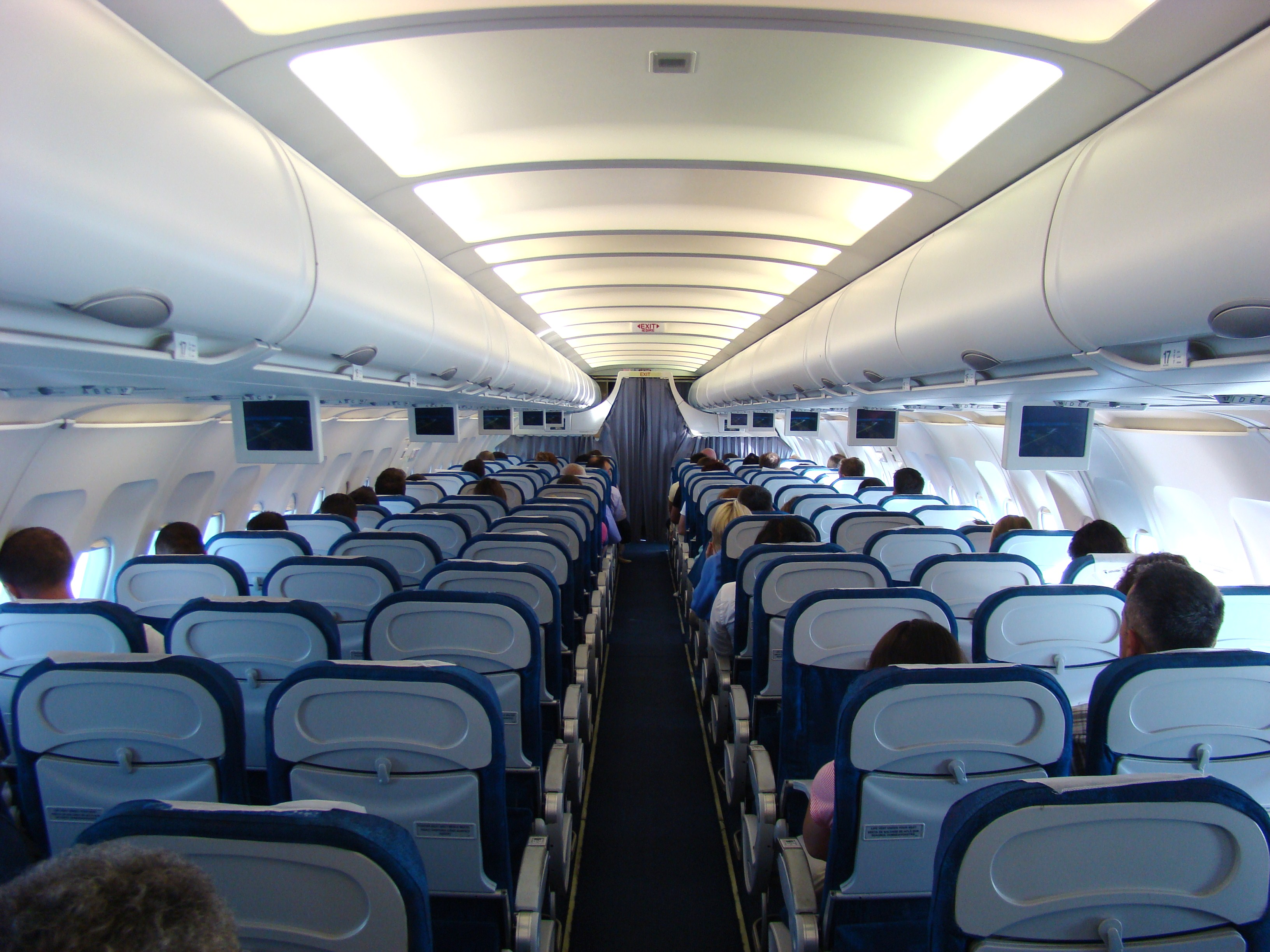 Interiorul aeronavei Airbus A318 „Smaranda Brăescu” aparținând companiei TAROM